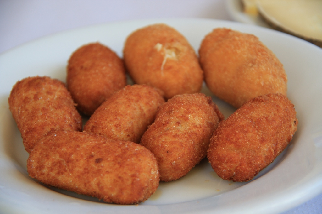 Croquetas. Tapas en La Pradera en Rascafría.